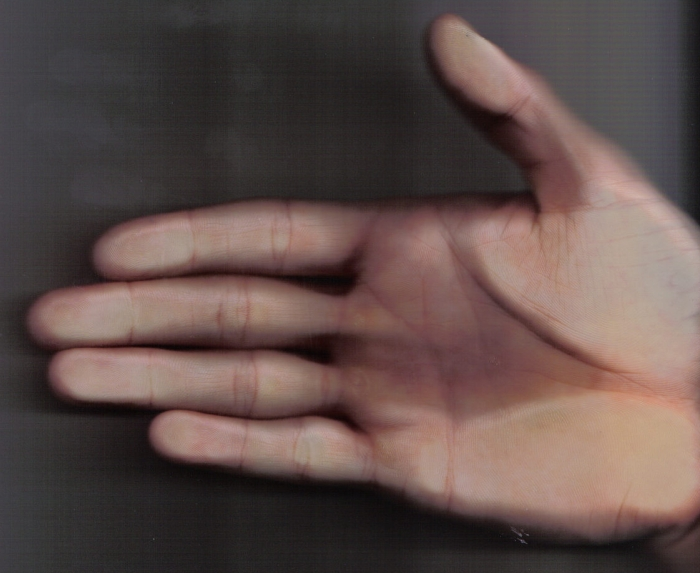 Hand zur Abmessung eines Stifnecks